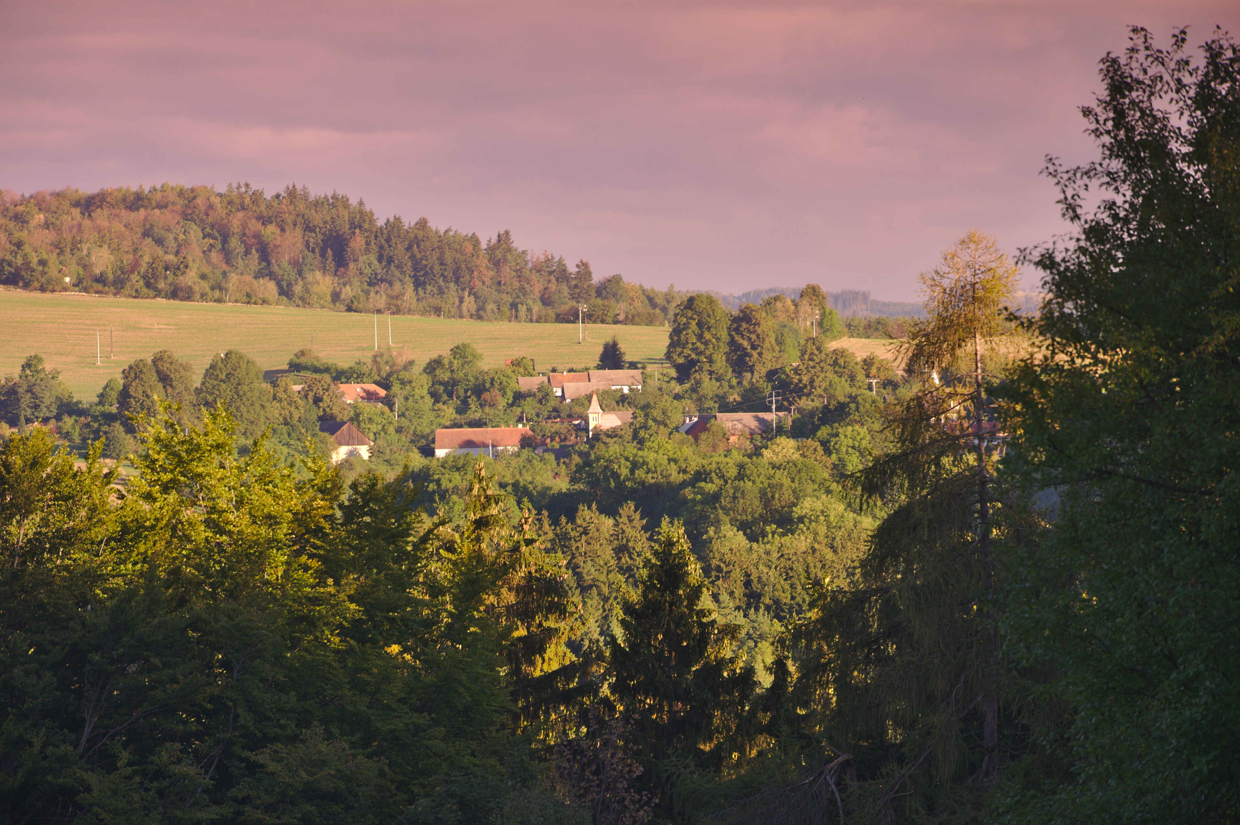 Pohled na obec od jihu, Touboř, Kunštát, okres Blansko